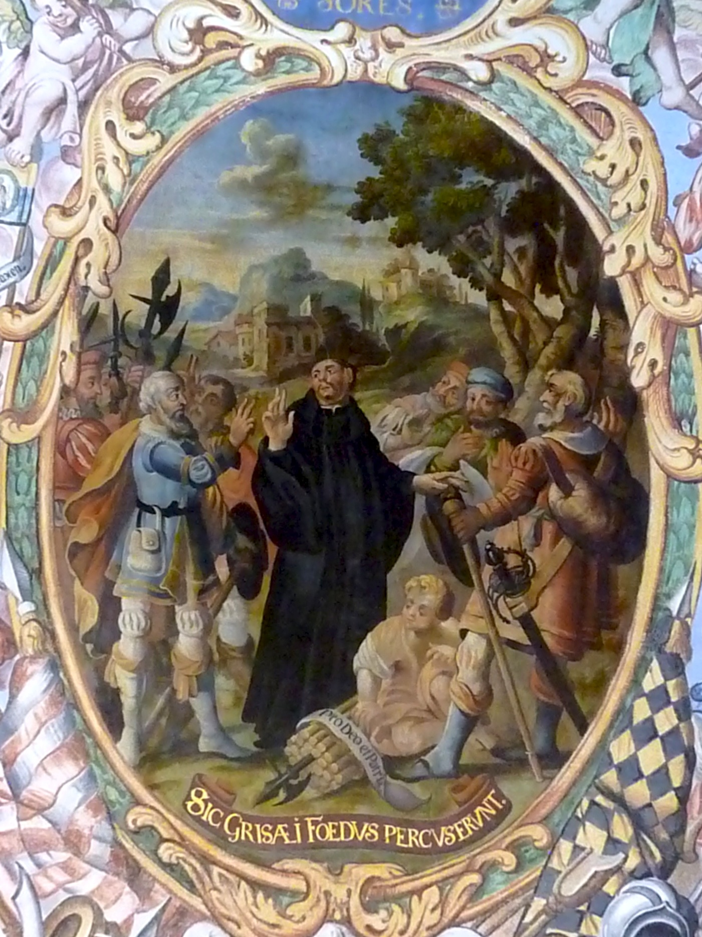 Gründung der Drei Bünde, dargestellt von einem Bild von Fridolin Eggert im Cuort Ligia Grischa